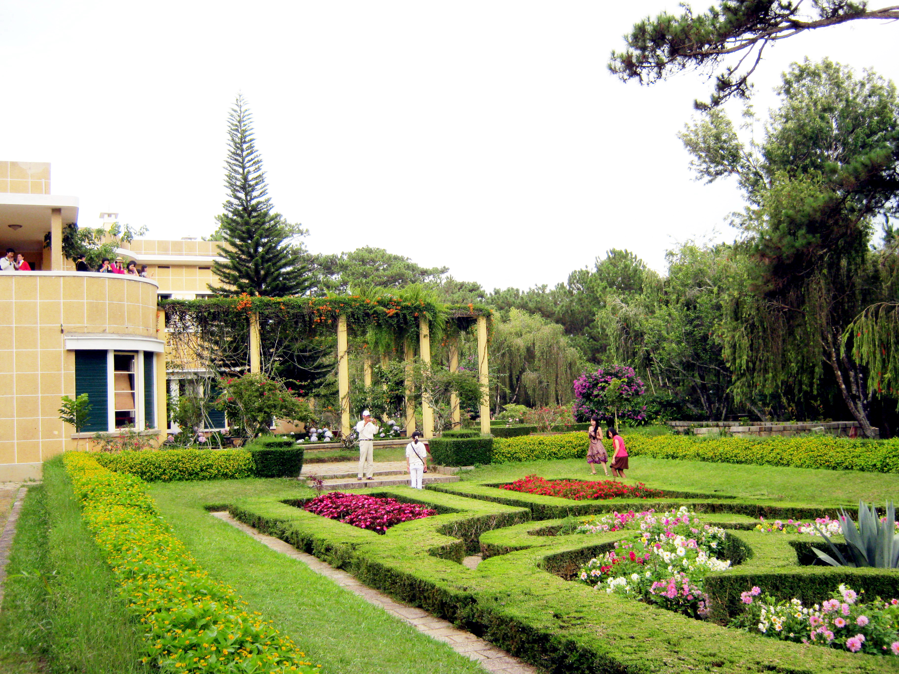 Vườn hoa trong khuôn viên Dinh Bảo Đại (Dinh III), thành phố Đà Lạt (Việt Nam).